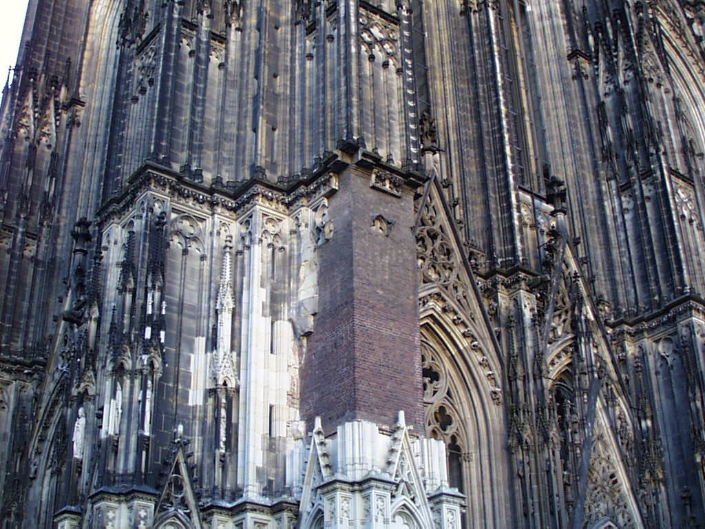 Domplombe am Kölner Dom vor der Verkleidung